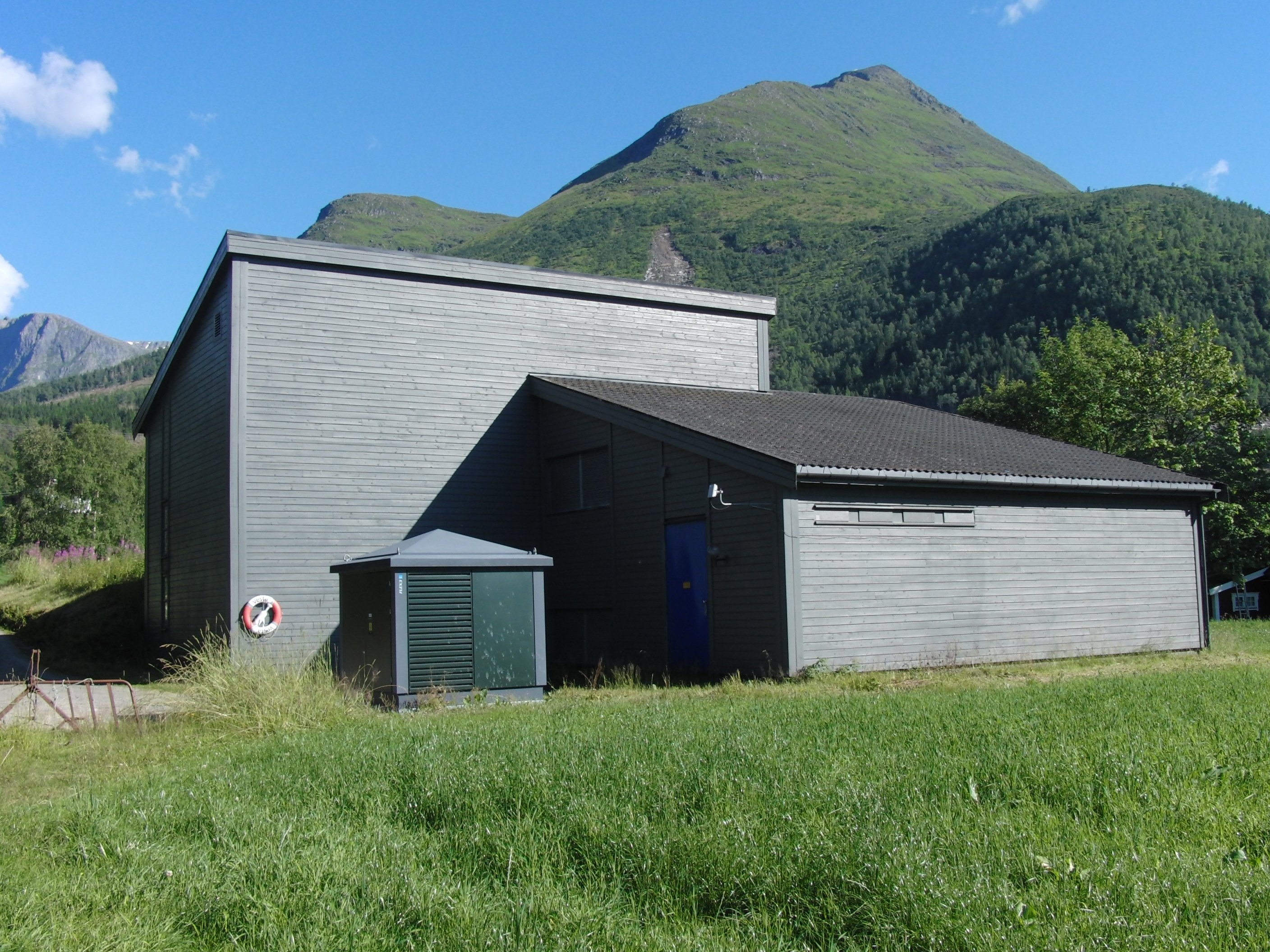 Vatne kraftverk